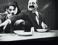 fotografía de la película His Trysting Place de Charlie Chaplin de 1914.